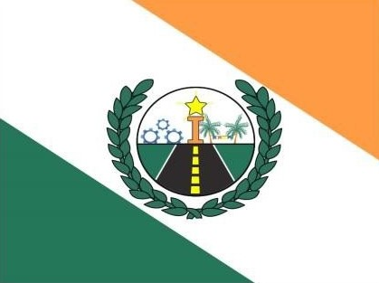 A Bandeira de Itinga do Maranhão foi criada e oficializada, através da Lei Municipal n.° 036/98 de Abril de 1998.